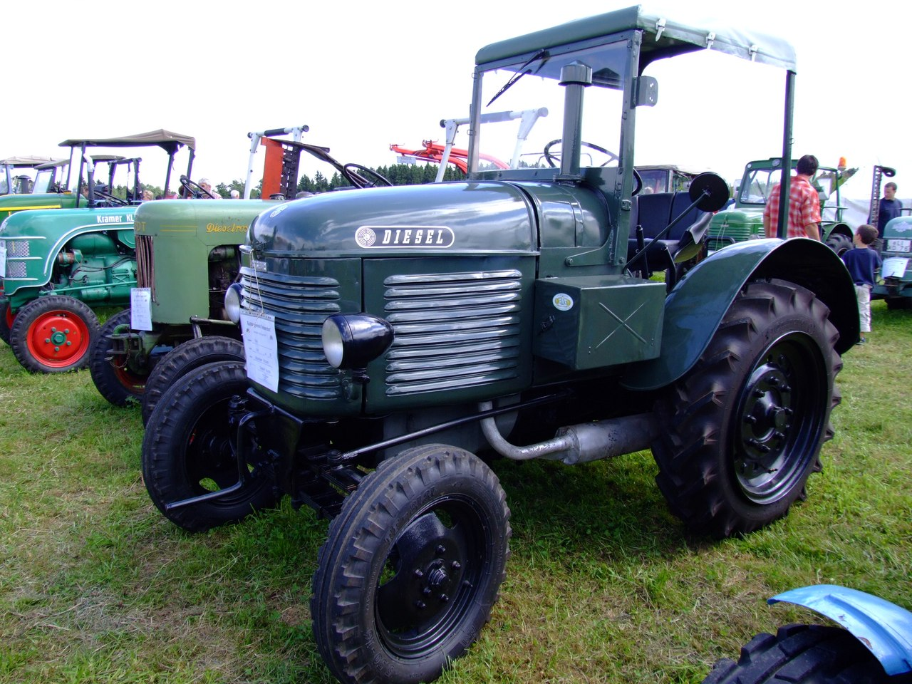 Steyr-Traktor mit 26 PS, Baujahr 1948